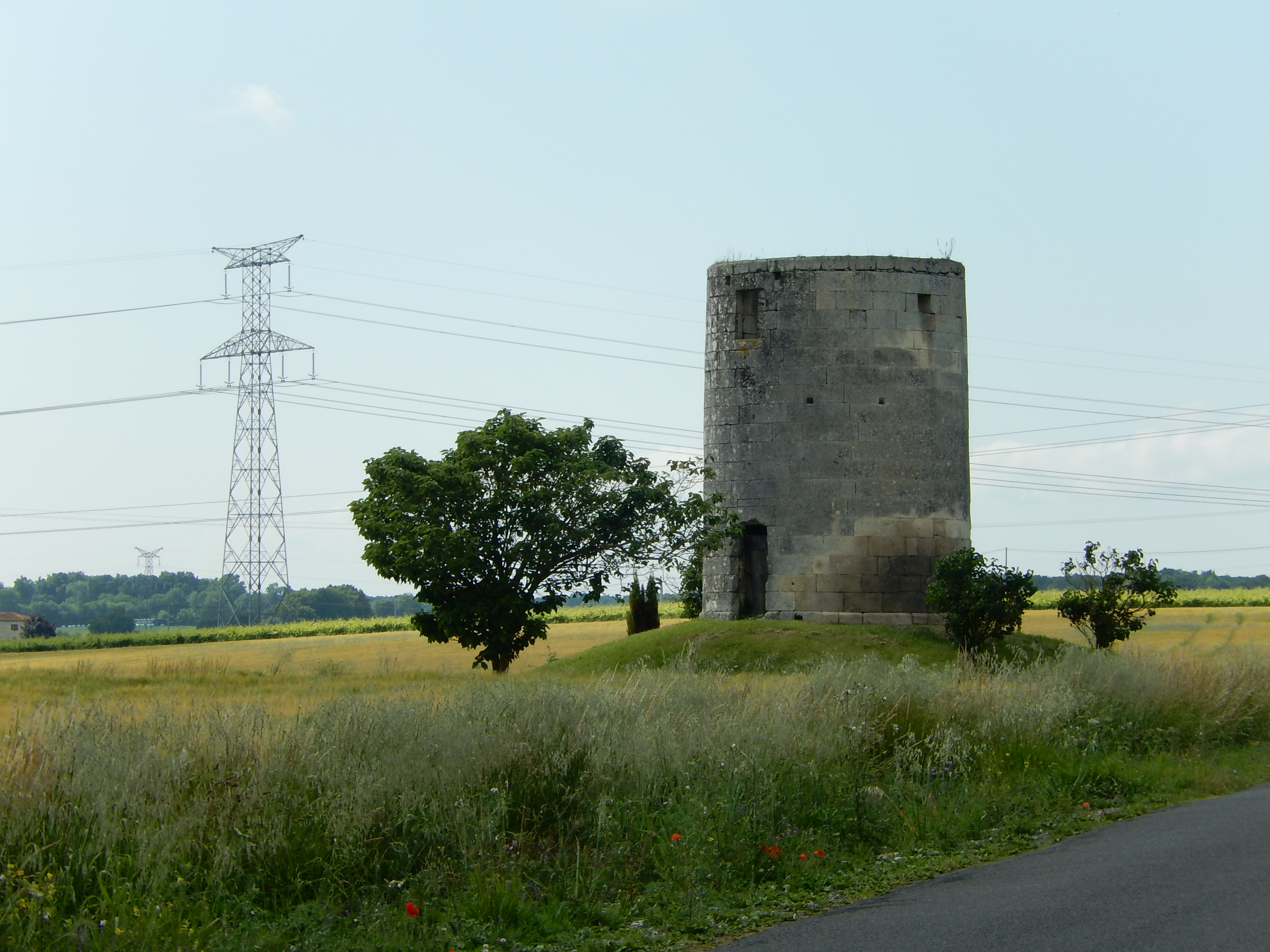 Un ancien moulin situé sur la commune de Berneuil (Charente-Maritime, France). On aperçoit en arrière-plan une ligne électrique, qui est raccordée au poste électrique situé sur la commune voisine de Préguillac.